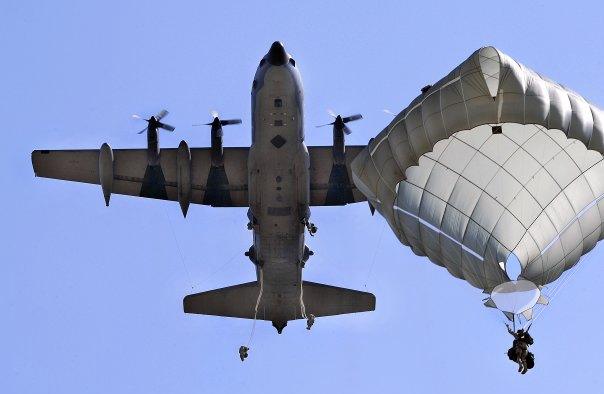 Truppenfallschirm T-11 unter MC-130 der amerikanischen Streitkräfte